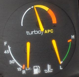 SAAB 900 turbo/APC dashboard gauge.